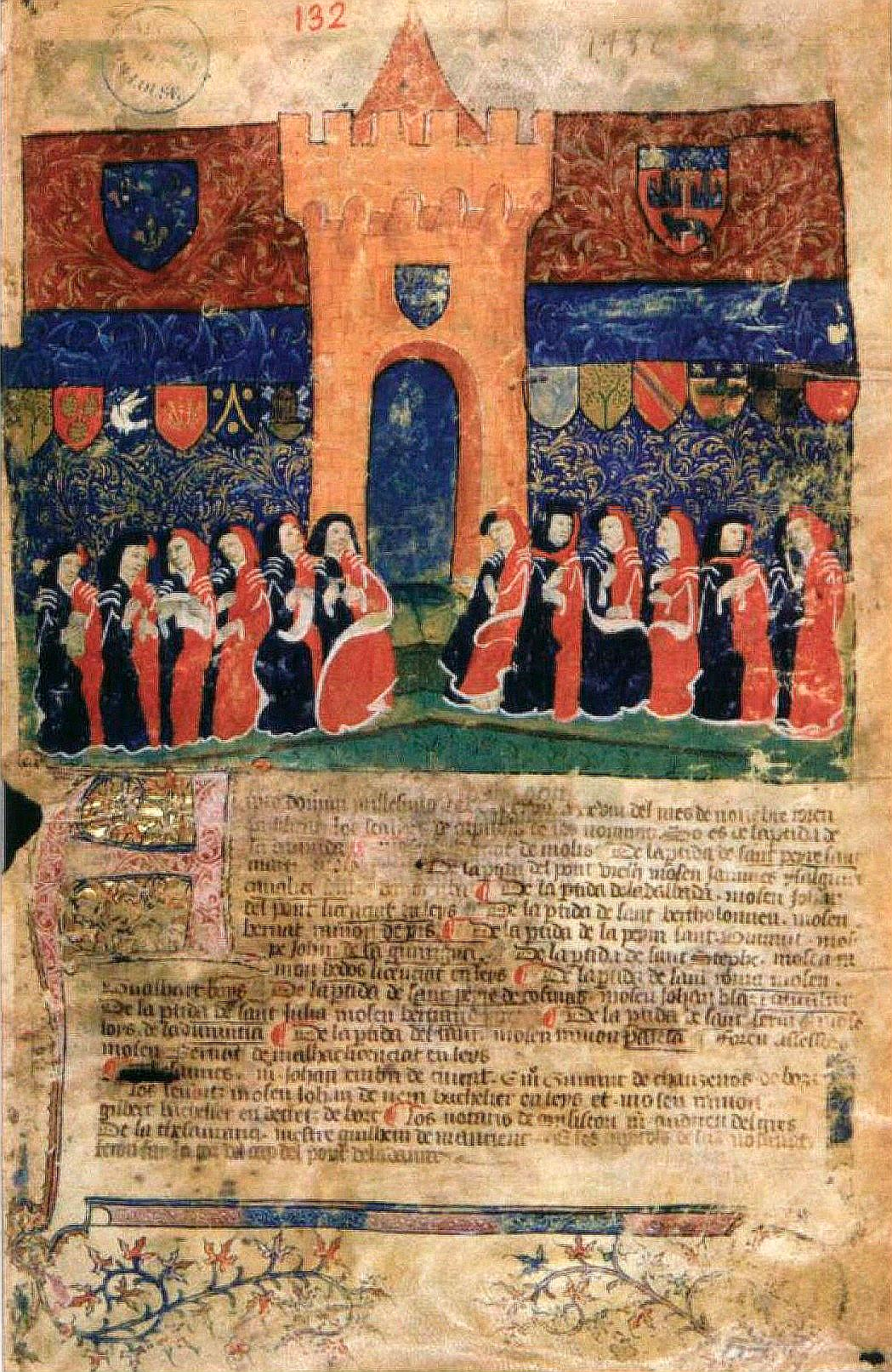 Les capitouls toulousains en 1437-1438, devant la Tour du Pont de la Daurade (versus Saint-Cyprien)